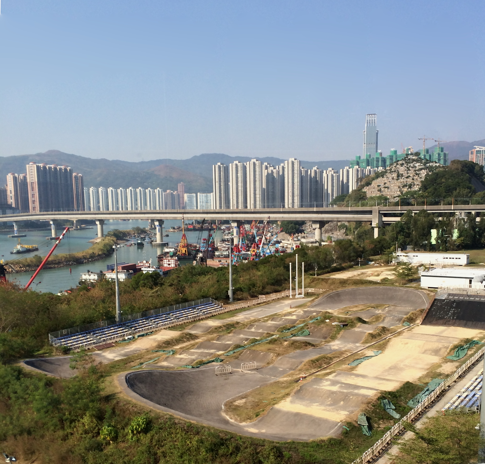 Hong Kong International BMX Park